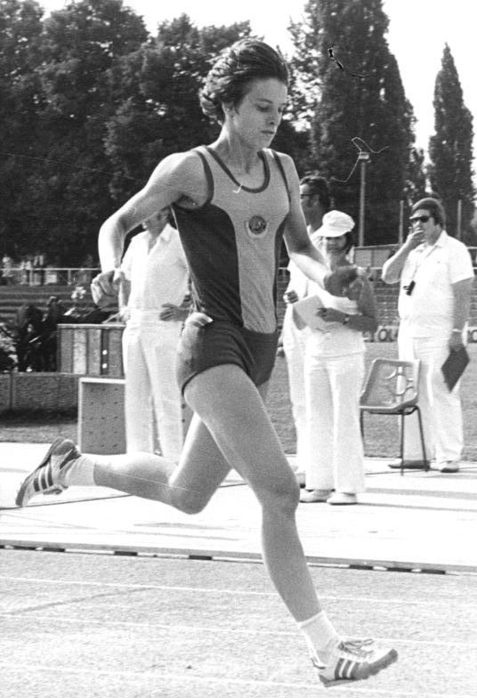 Sigrun Ludwigs ADN-ZB Weisflog 24.7.82 Cottbus: DDR-Leichtathletikmeisterschaften der Junioren - Siegerin im 400-m-Lauf der Juniorinnen wurde Sigrun Ludwigs vom SC Traktor Schwerin in der Zeit von 53,98 s. (siehe 41 und 42 N) .